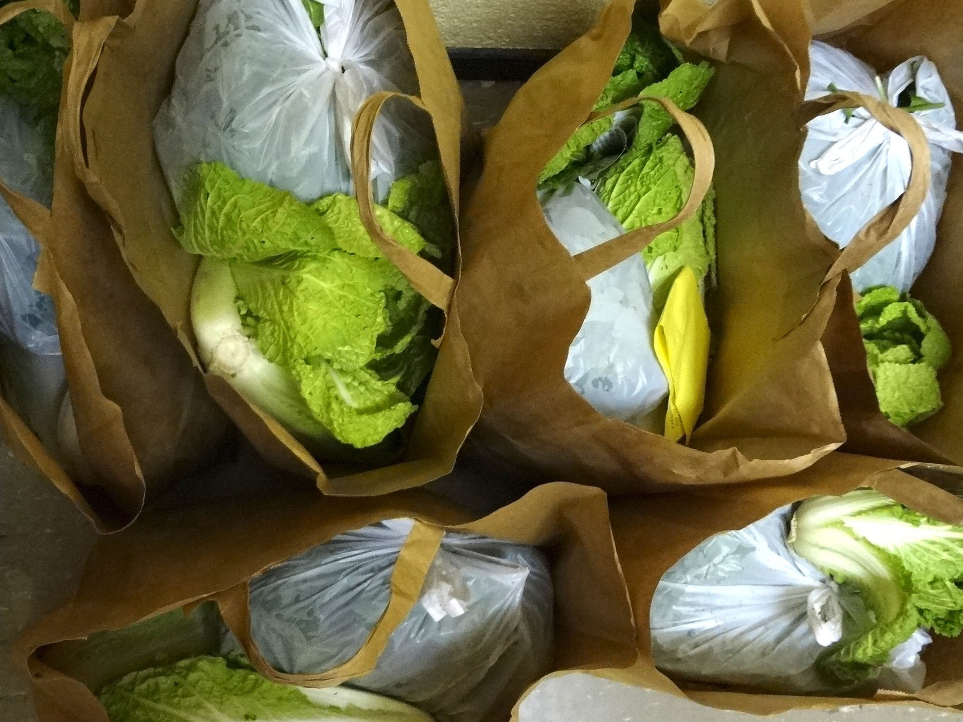 Livraison hebdomadaire de légumes dans un quartier de Genève. Coopération des Jardins de Cocagne.